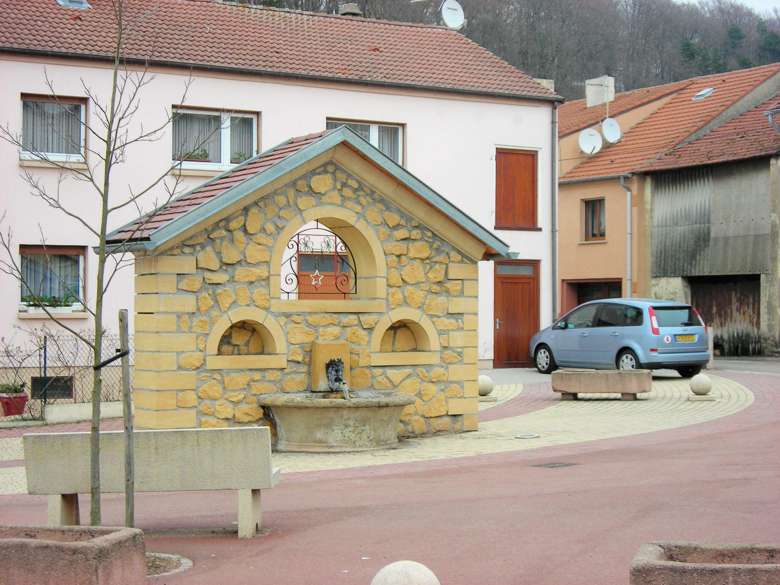 Fontaine au centre du village de Berviller-en-Moselle (57 France)